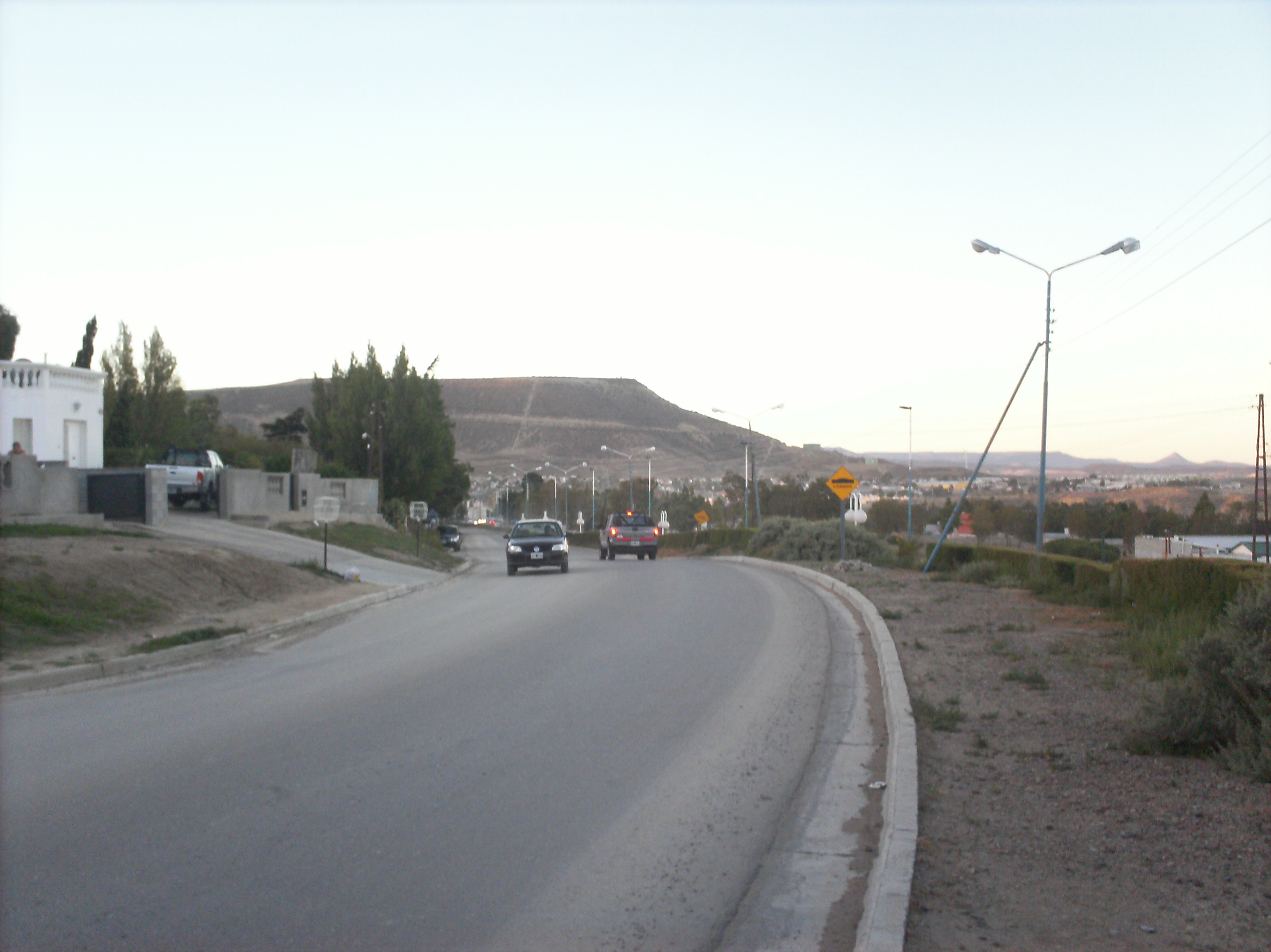 el cerro hermitte de fondo en km3